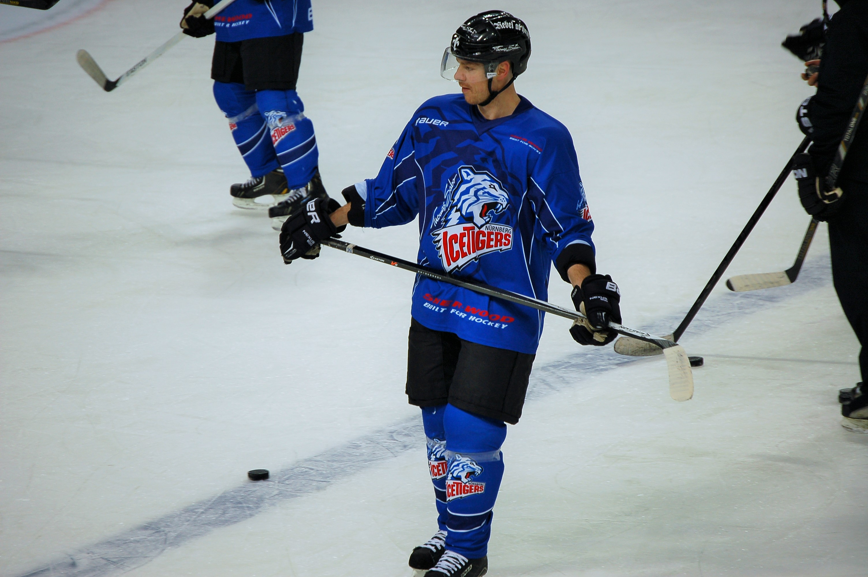 Steven Reinprecht im Training bei den Nürnberg Ice Tigers